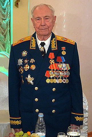 Маршал Советского Союза Д. Т. Язов на церемонии награждения орденом Александра Невского в Кремле, 8 ноября 2014 года.